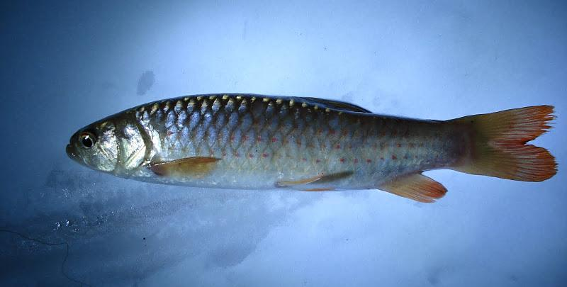 Piabucina boruca es una especie de peces de la familia Lebiasinidae en el orden de los Characiformes.